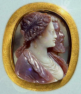 Альфонсо I д'Эсте и Лукреции Медичи. Середина XVI в. Италия. Четырехслойный агат. Из собрания герцога Орлеанского в Париже, 1787 г. // Cameo of Lucrezia Borgia and Alfonso I d'Este. Hermitage